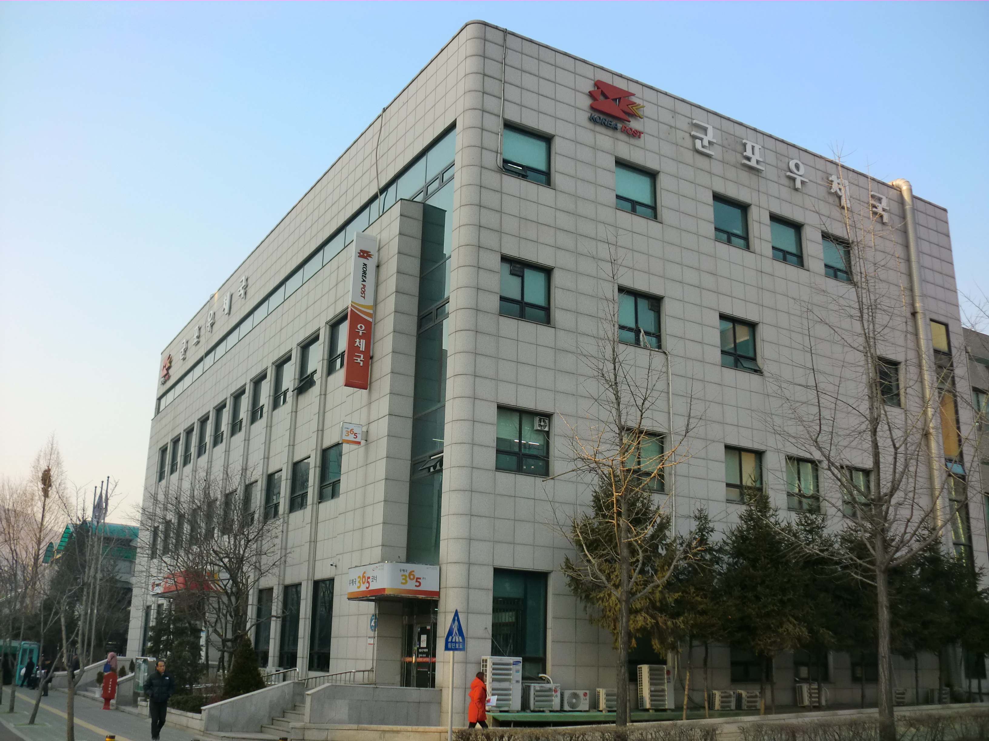 경기도 군포시에 있는 군포우체국